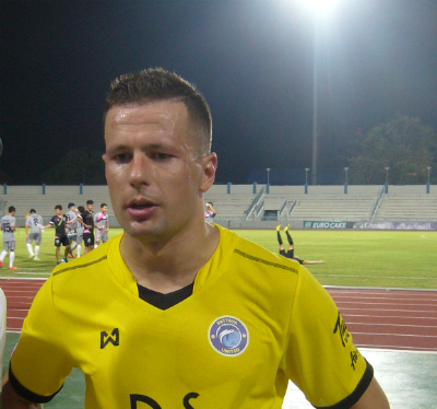 Nikola Komazec